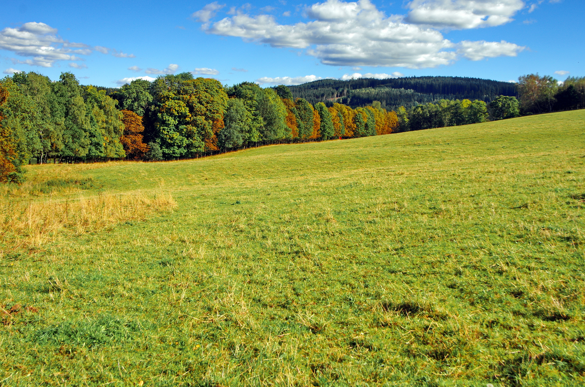 Krásná Lípa, zaniklá obec, stará alej nad zaniklou obcí, Slavkovský les, okres Sokolov